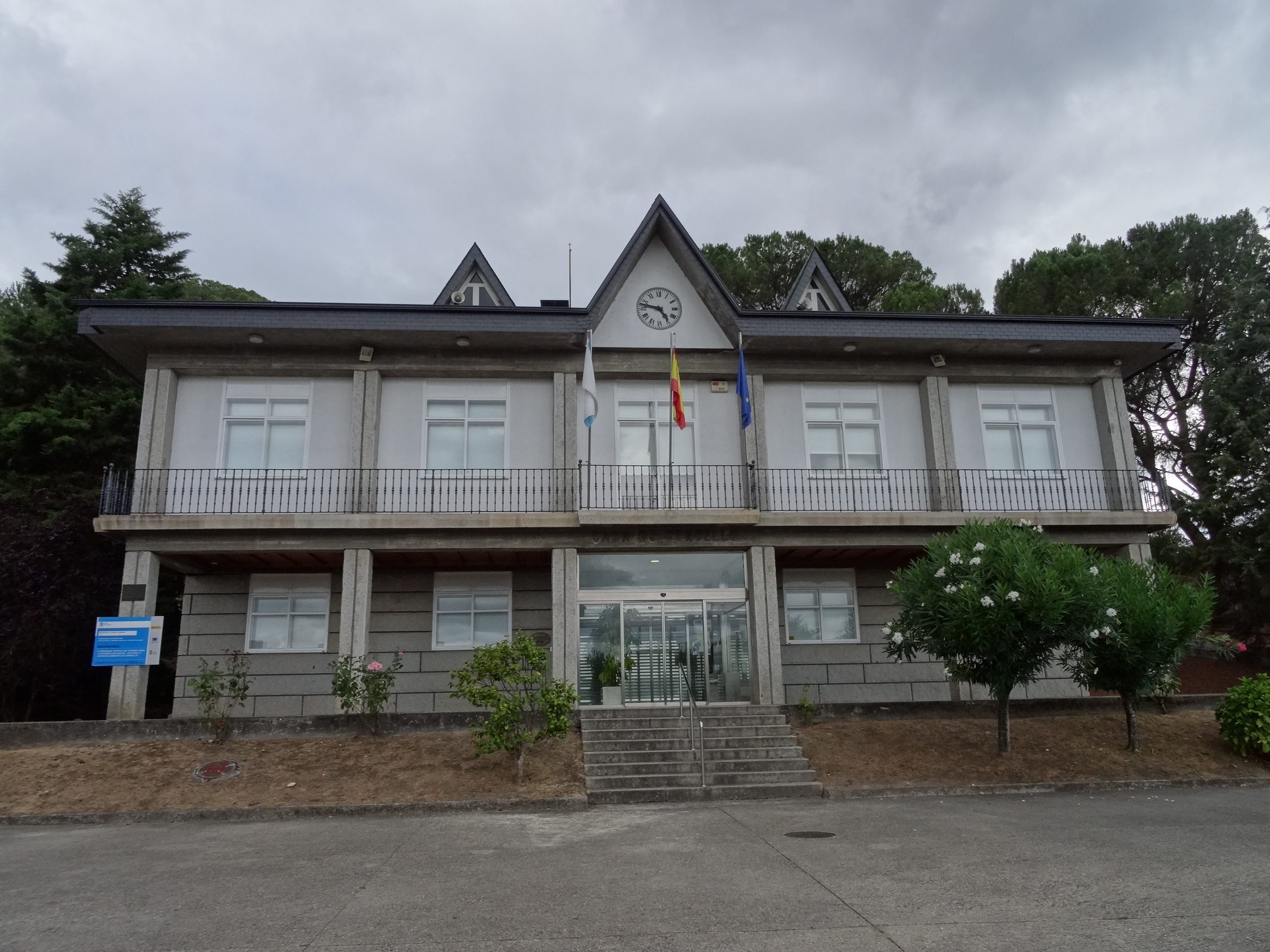 Ver título.